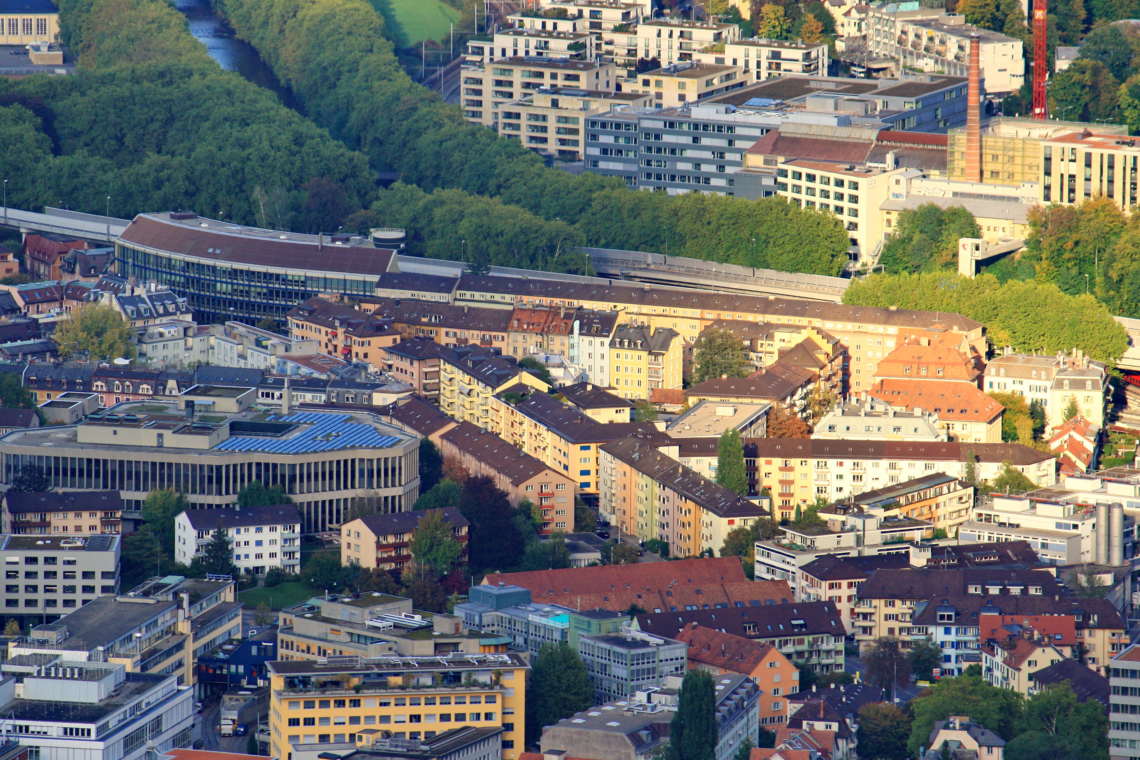 Zürich-Alt-Wiedikon, as seen from Uetliberg Aussichtsturm, Sihl river in the background.